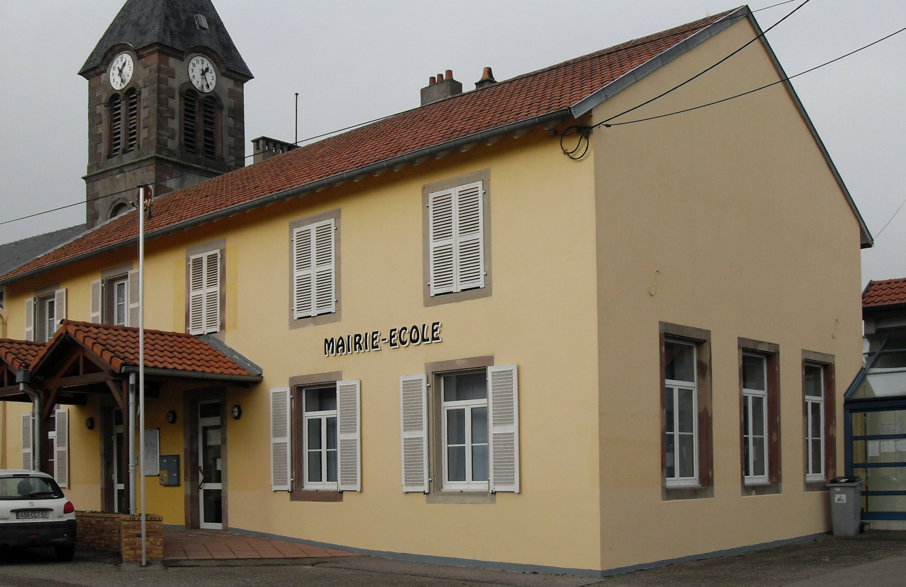 La mairie et l'école à Vieux-Lixheim